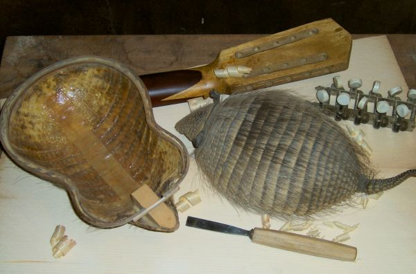 Charango készítése quirquinchóból (tatuból)